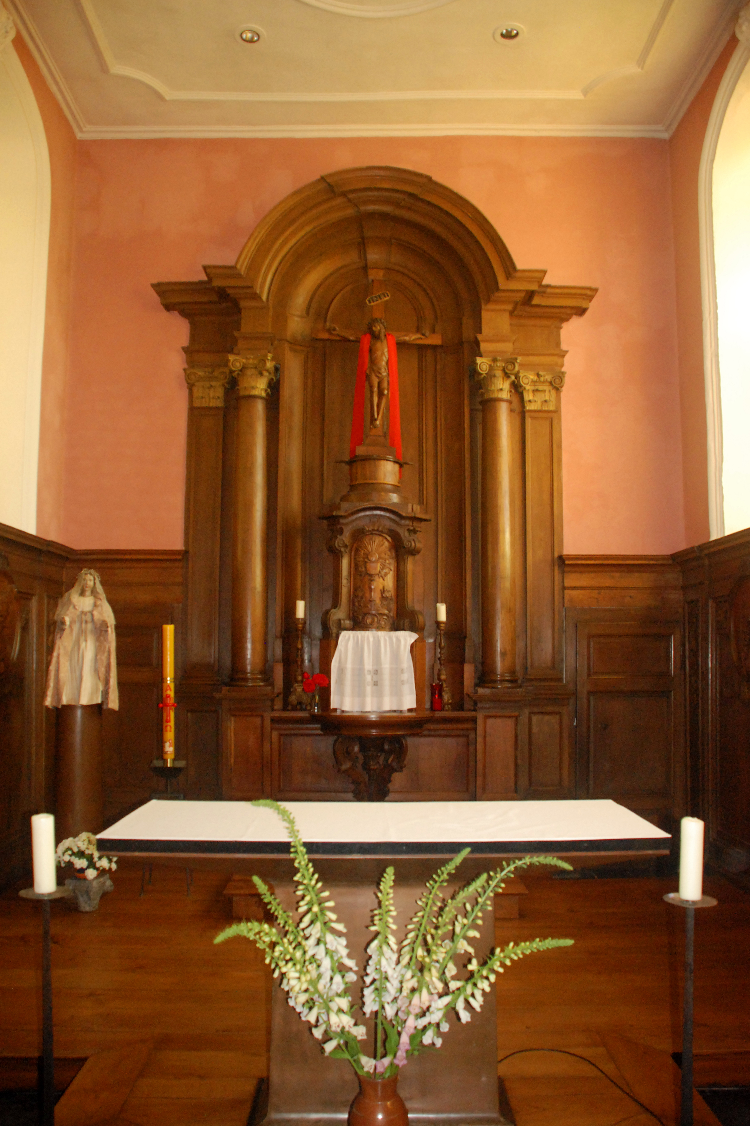 Belgique - Brabant wallon - Genappe - Glabais - Église Saint-Pierre